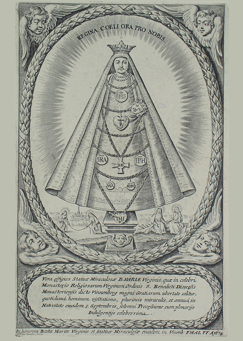 Kupferstich des Vinnenberger Marienbildnisses